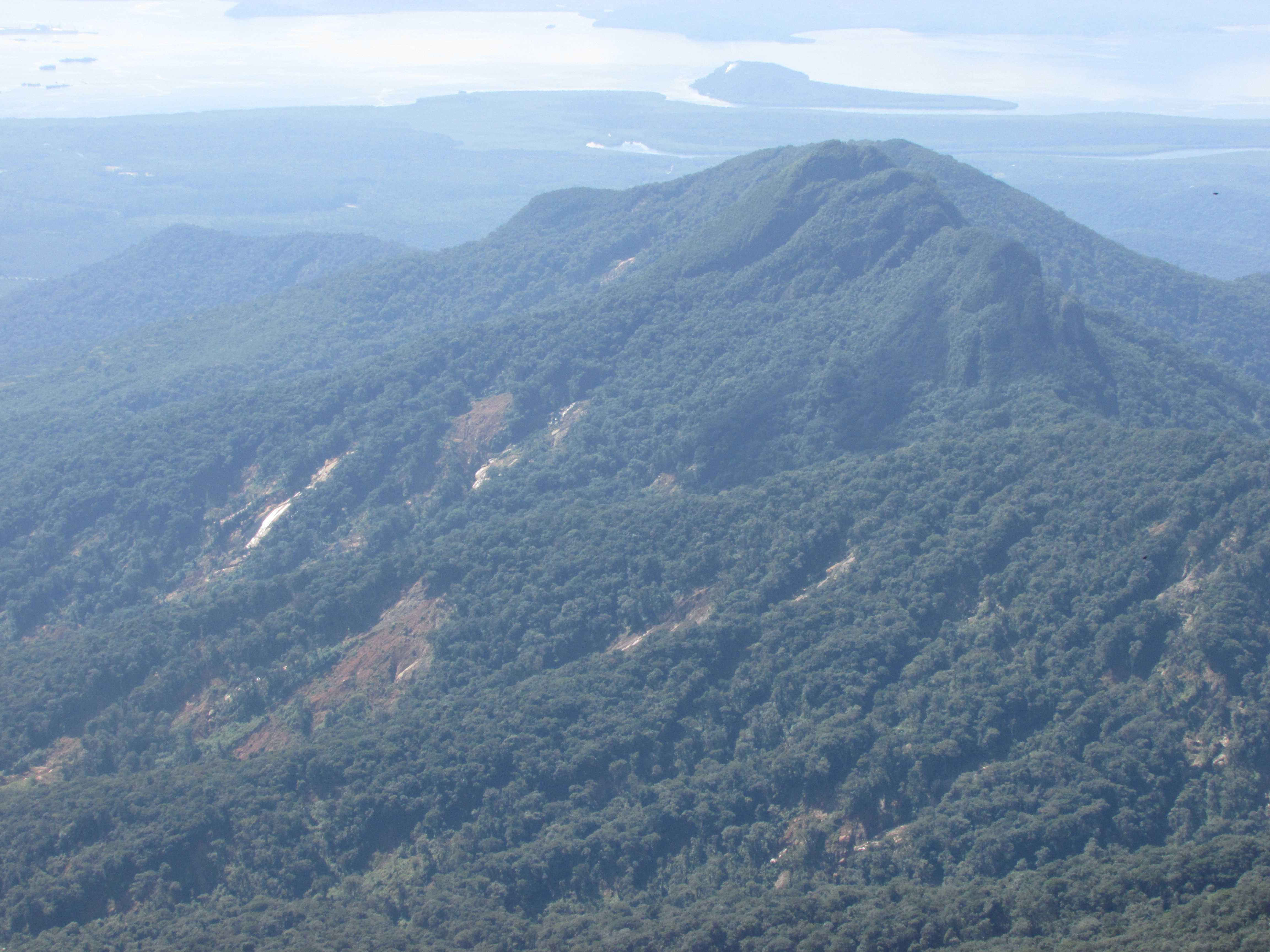 Deslizamentos provocados pela chuva de 2011 no Parque Nacional de Saint-Hilaire/Lange